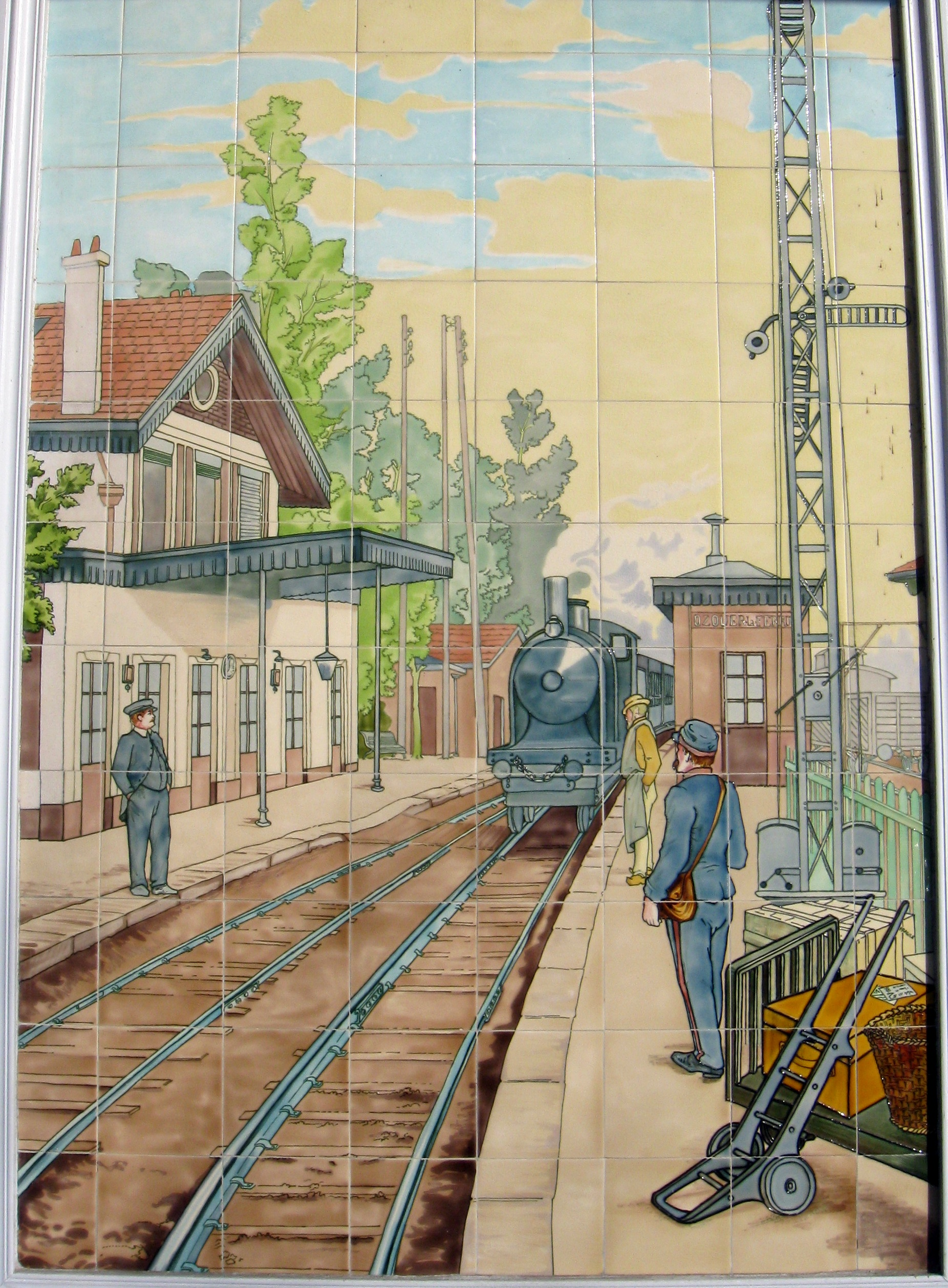 Entrée d'un train en gare d'Ozoir-la-Ferrière, panneau en céramique du céramiste A.-J. Arnoux . (Ancien café Saint-Rémy, Seine-et-Marne, région Île-de-France).